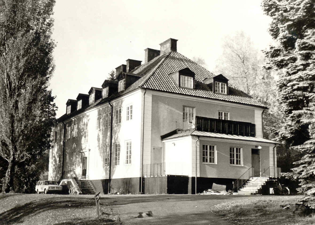 Bona i Västra Ny, cirka 1990. En bild av Harri Blomberg.